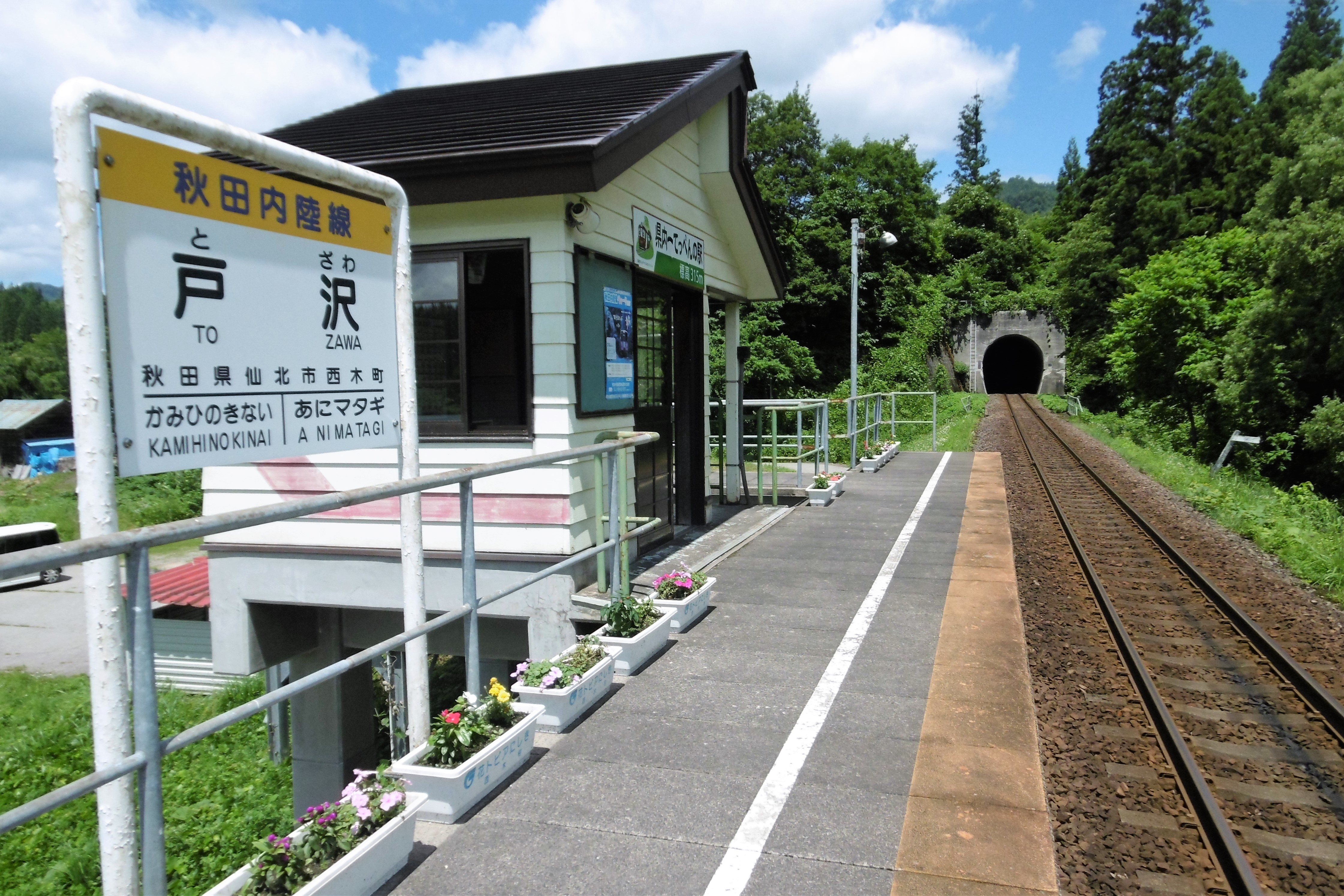 秋田内陸縦貫鉄道・戸沢駅：秋田県仙北市西木町